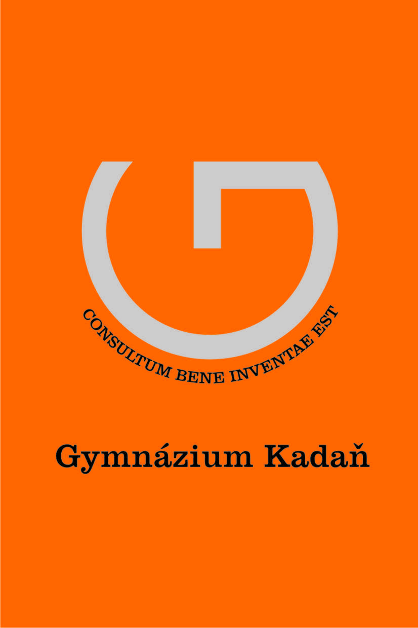 Vlajka Gymnázia Kadaň